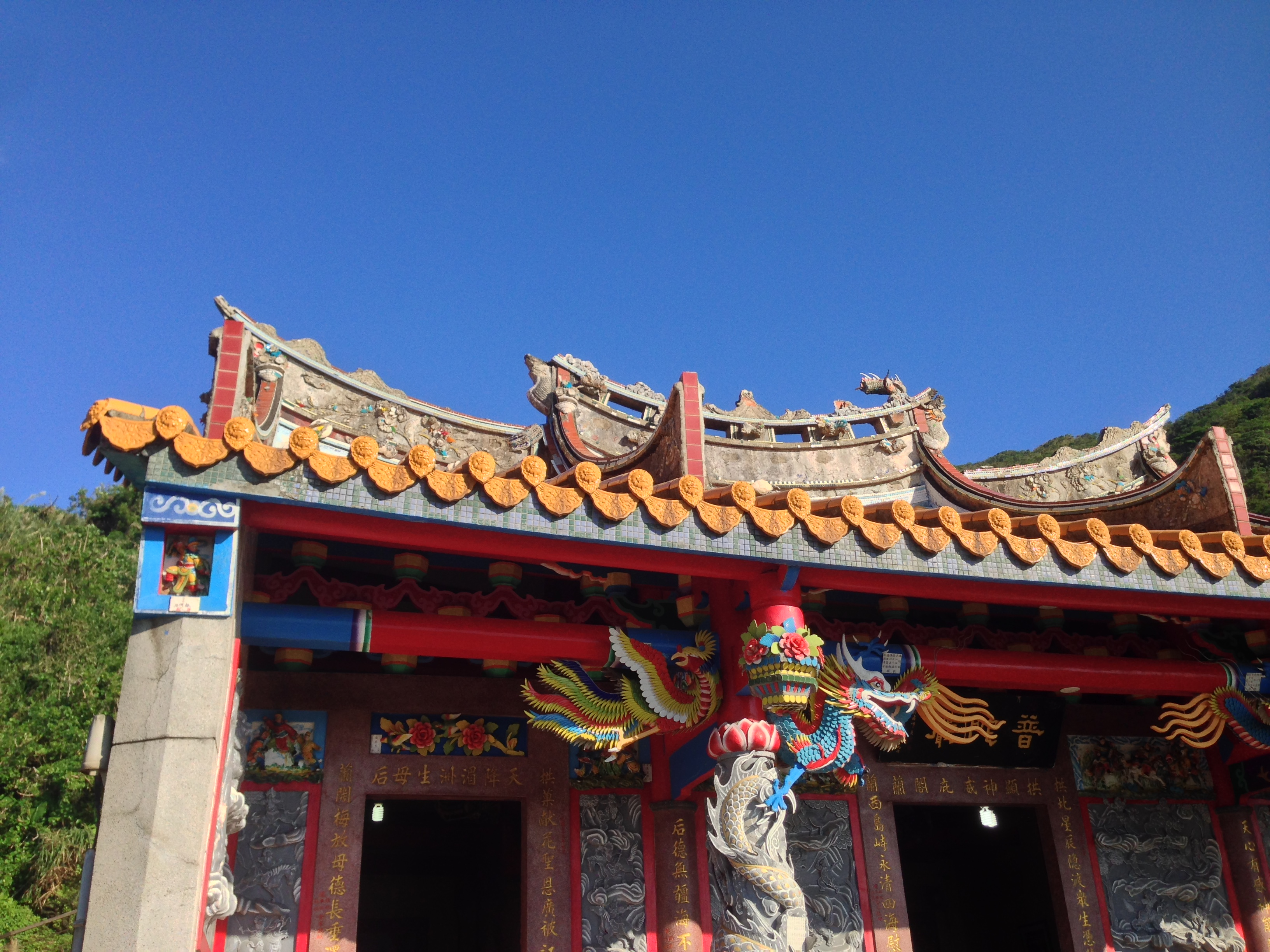 龜山島普陀巖破損廟簷